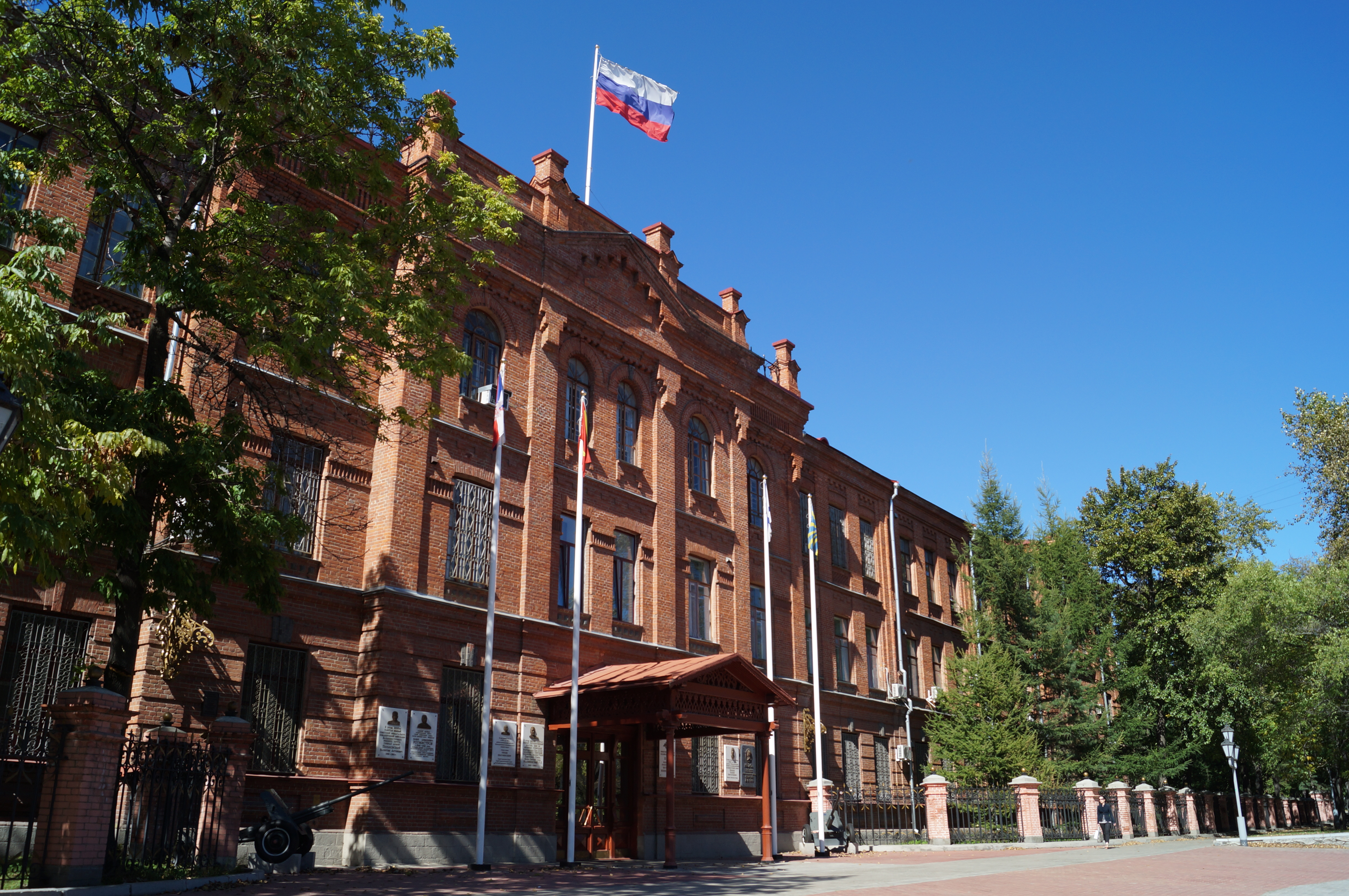 Кадетский корпус с домовой церковью Филиппа, митрополита Московского (Хабаровский край, Хабаровск, Серышева улица, 13)